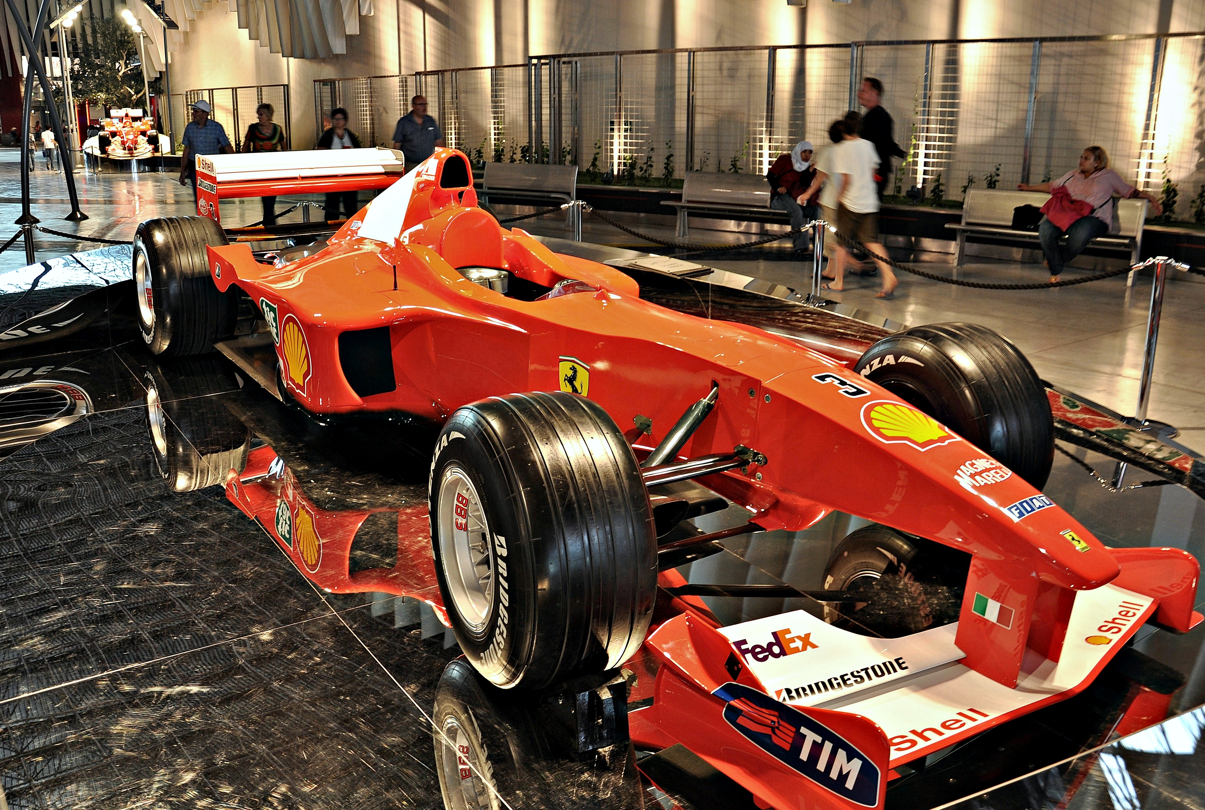 emiratos arabes